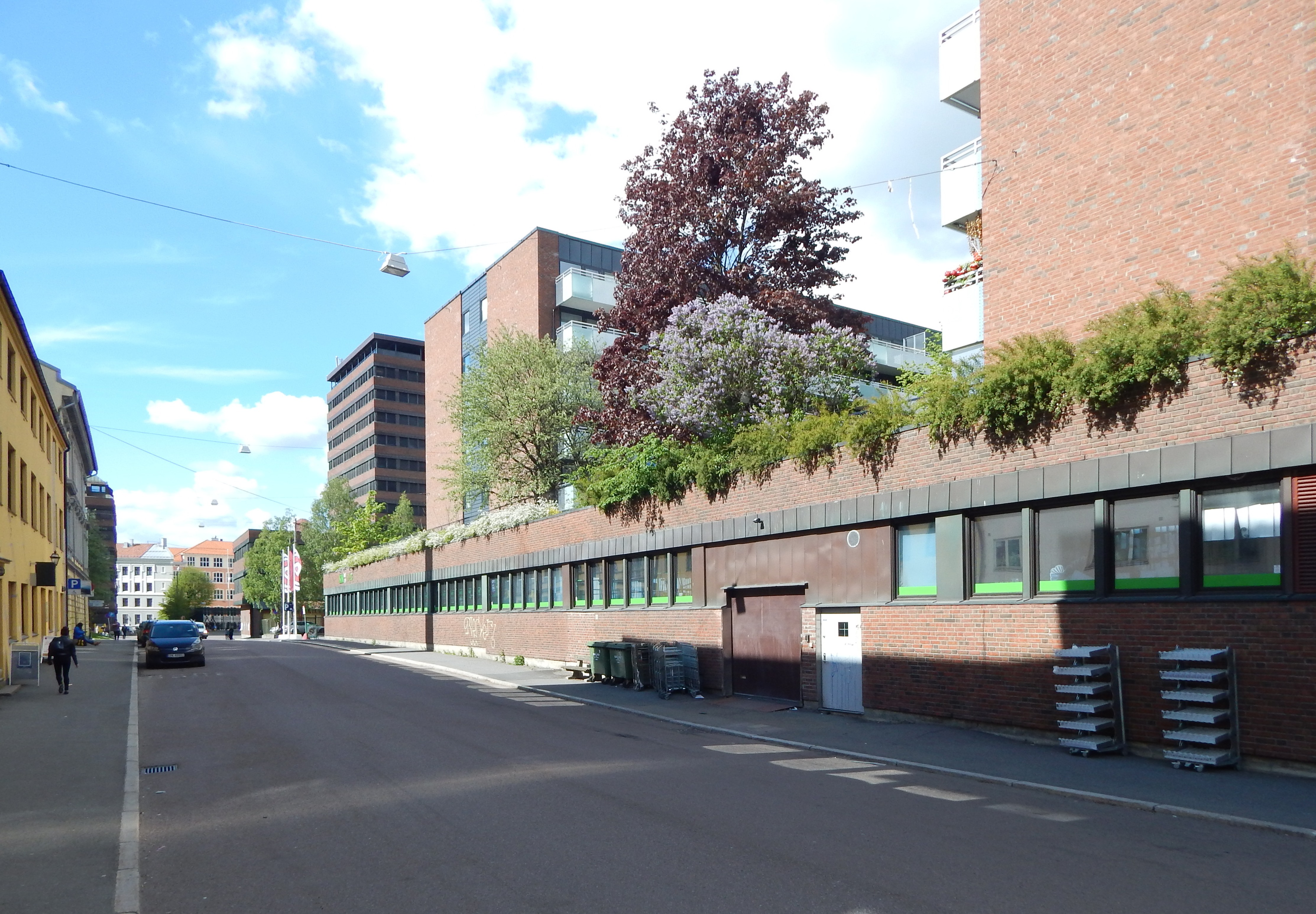 Kolstadgata